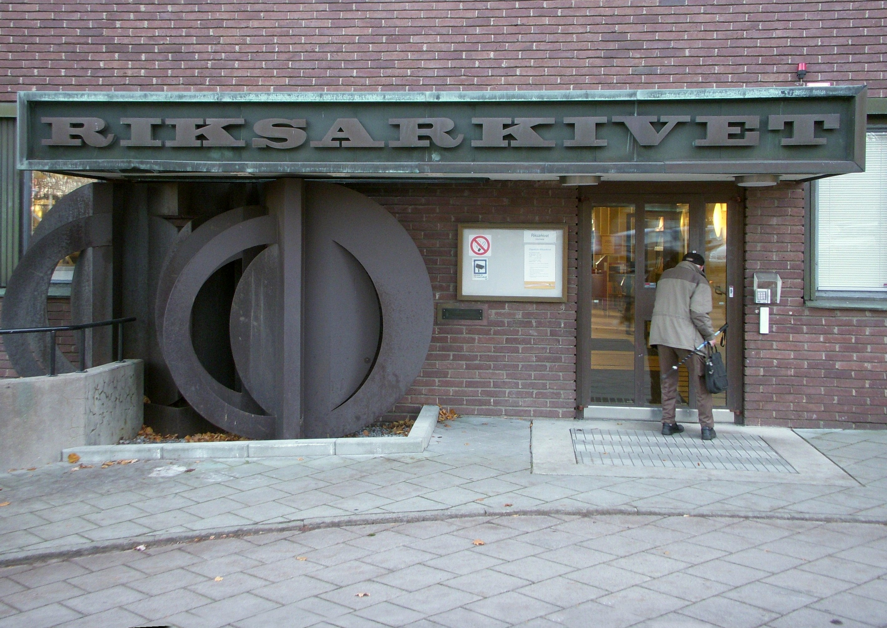 Riksarkivets huvudbyggnad på Kungsholmen, Stockholm, entré